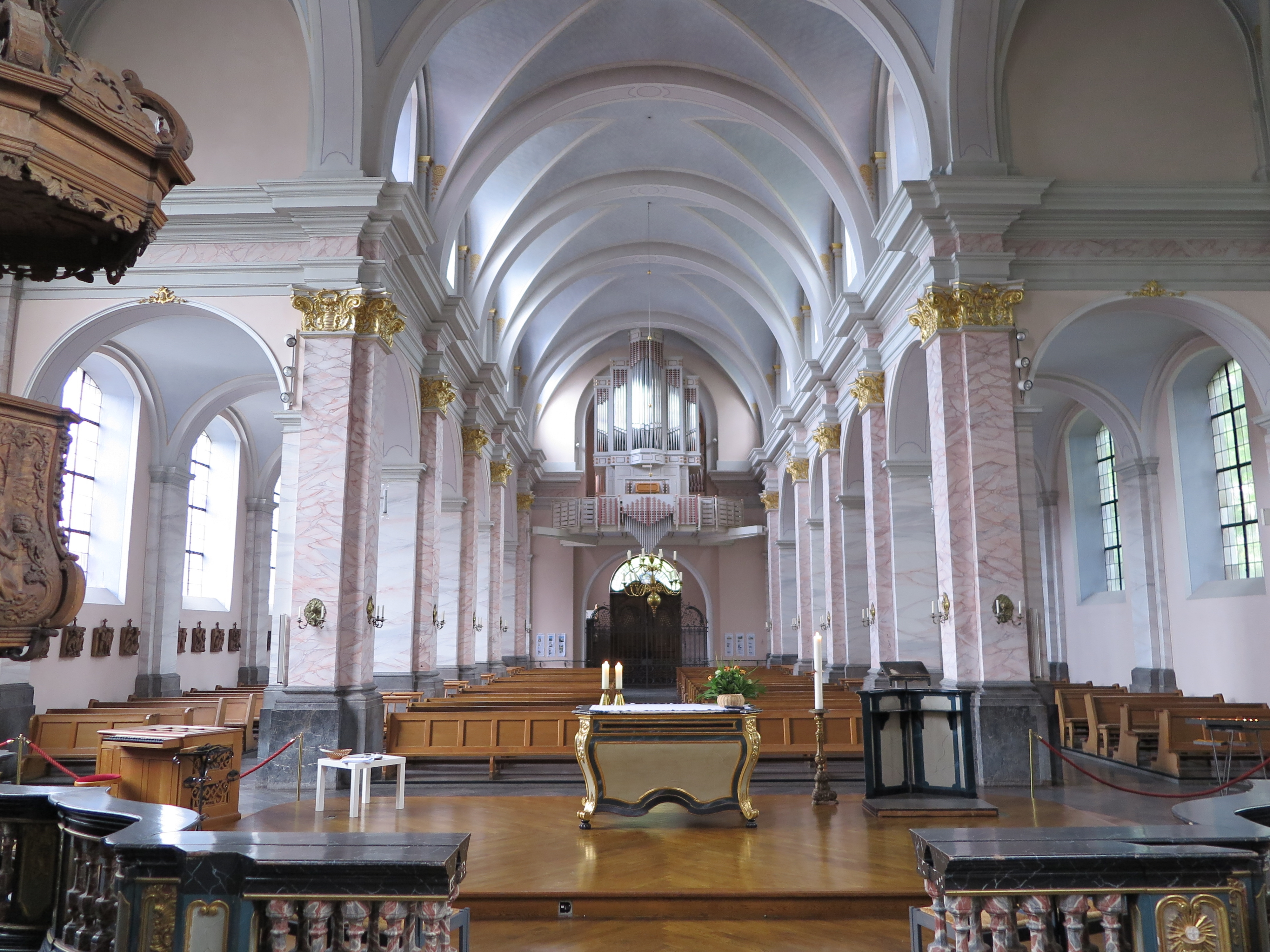 Blick in das Kirchenschiff von St. Michael in Aachen-Burtscheid.